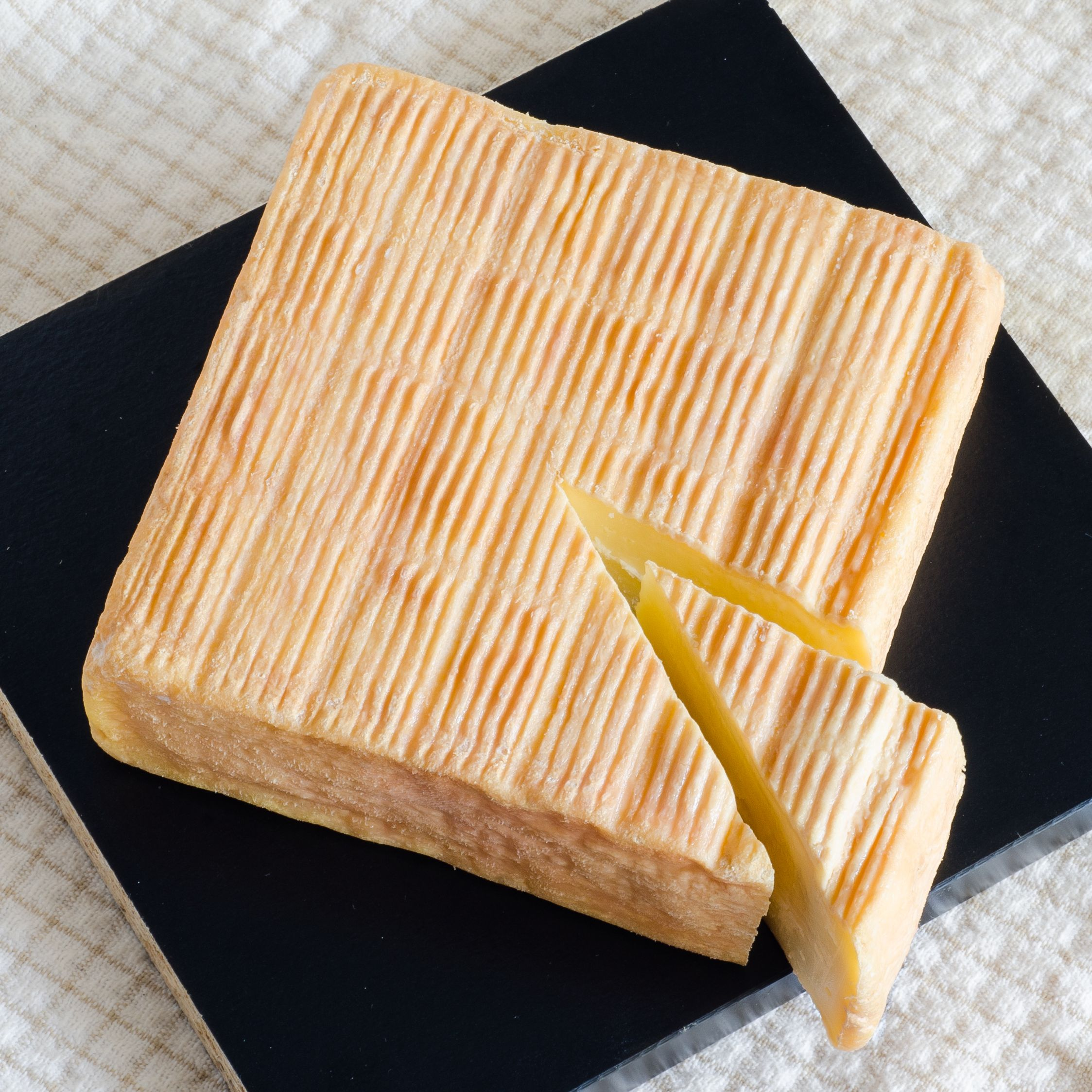 Maroilles fabriqué à Maroilles (59)